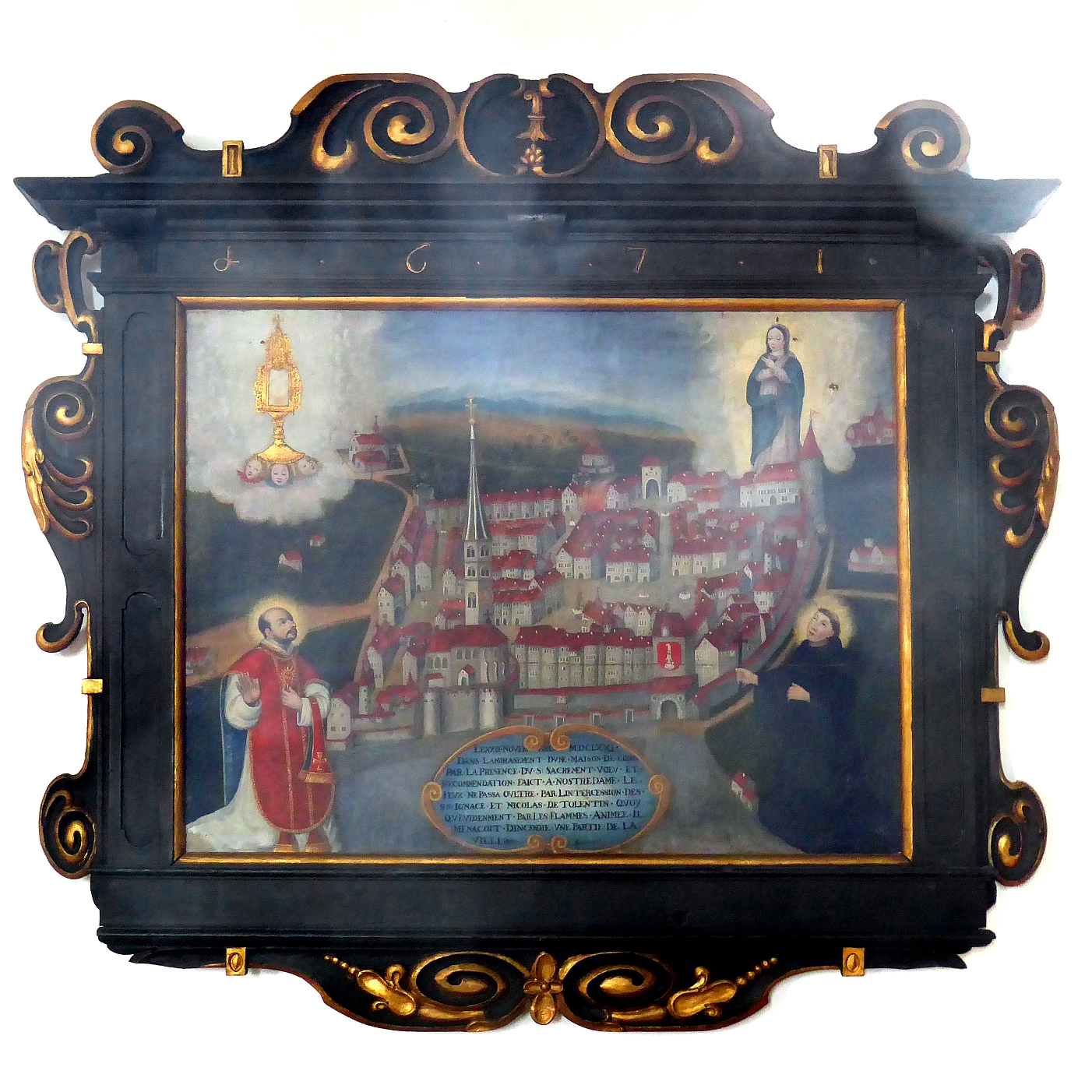 Gemälde, Maria mit Kirche,ChapeGemälde, Maria mit Kirche,Chapelle du Vorbourg